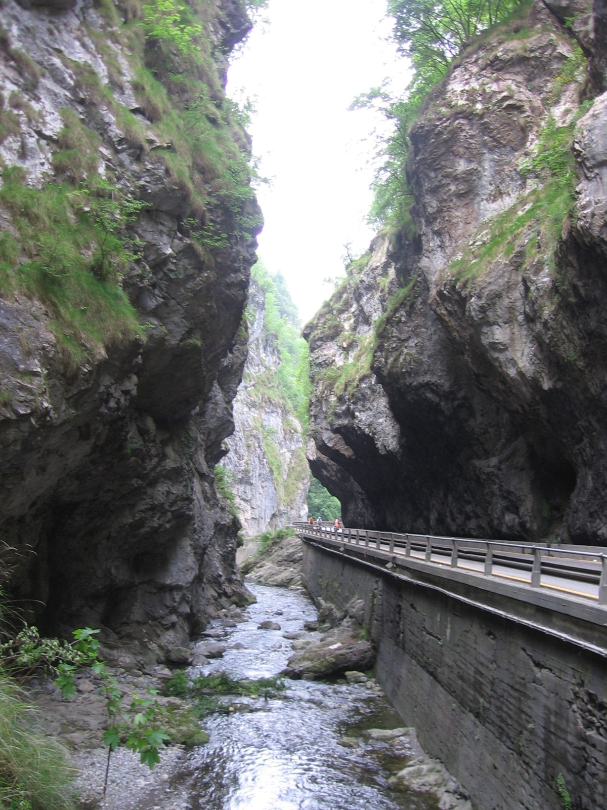 orridi di Bracca, Bergamo, Italia